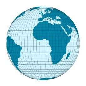 Azimutalprojektion mit transversaler Lage